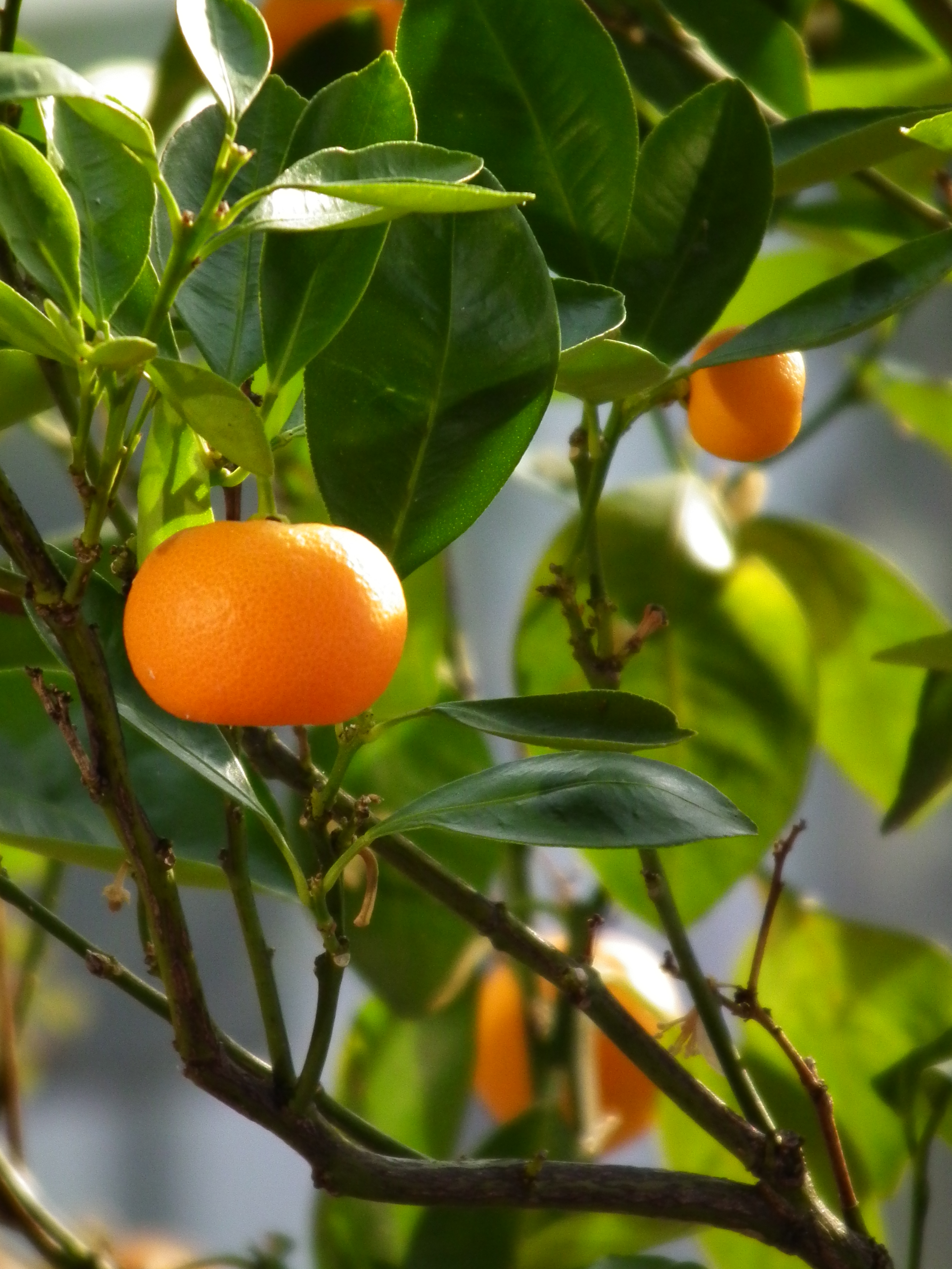 Mandarinenbäumchen (Citrus reticulata), fotografiert in einem Gewächshaus in Nordbaden (Deutschland)